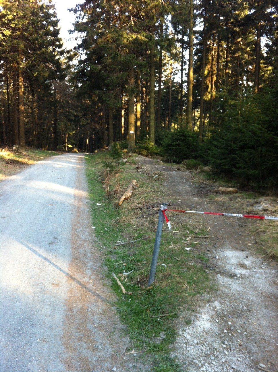 Flowtrail zwischen L3024 und Fuchstanz